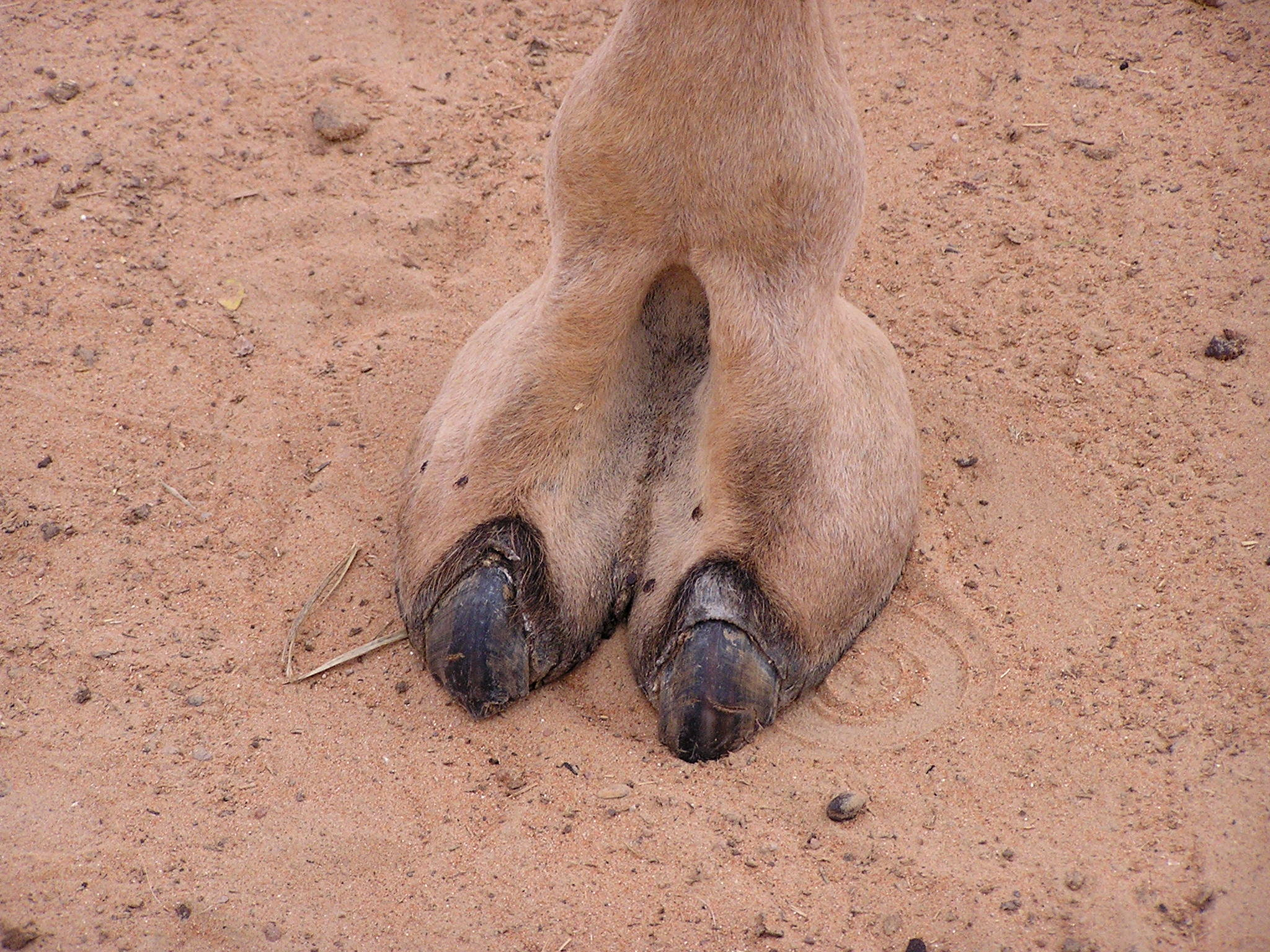 Dromedar-Fuß, Dubai, VAR